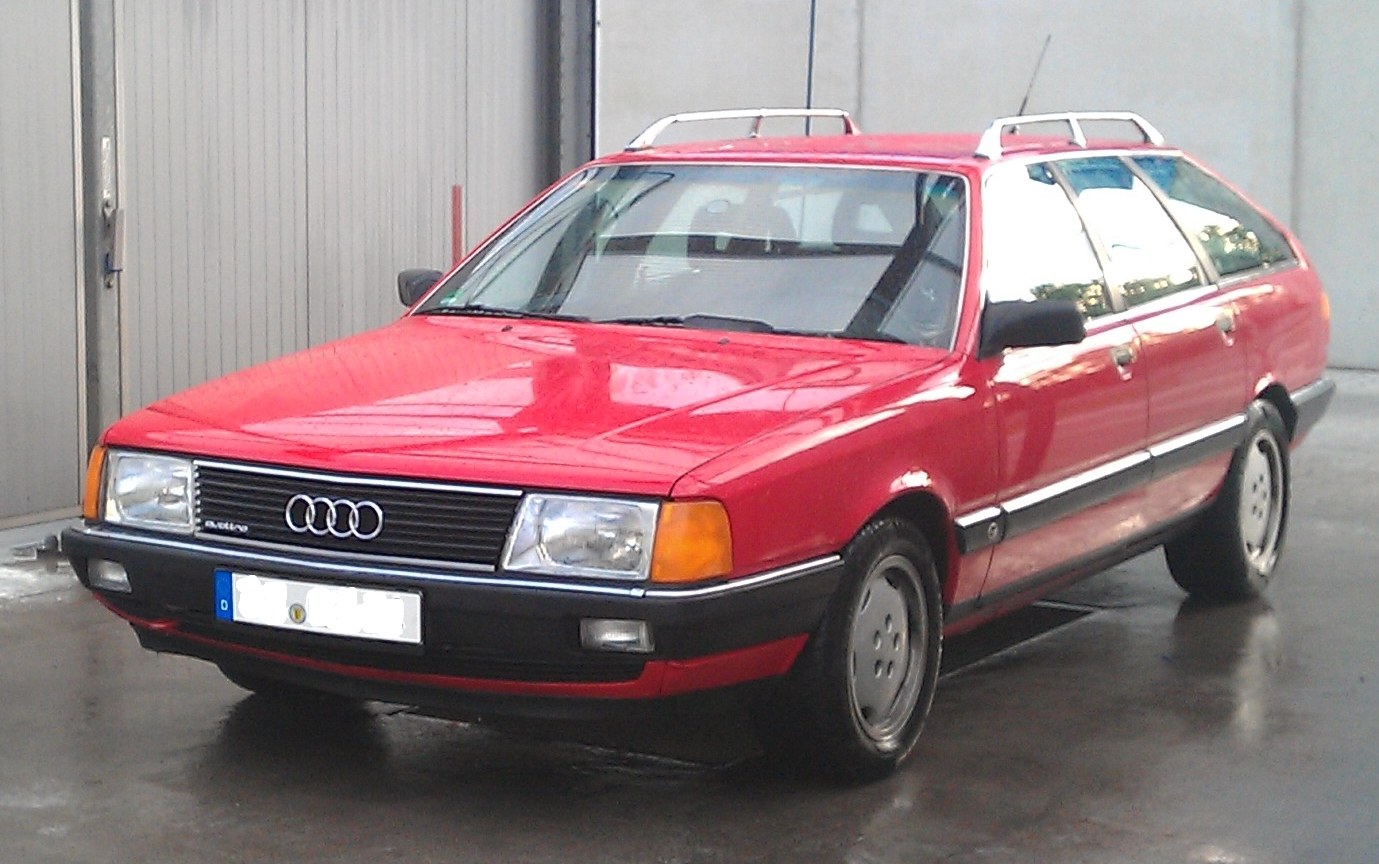 1990 Audi 100 Avant quattro "Sport" 2.3 E NF/AAT/AML/LY3D/834/NX, Modell 445PH5 + S711, KBA 0588/485